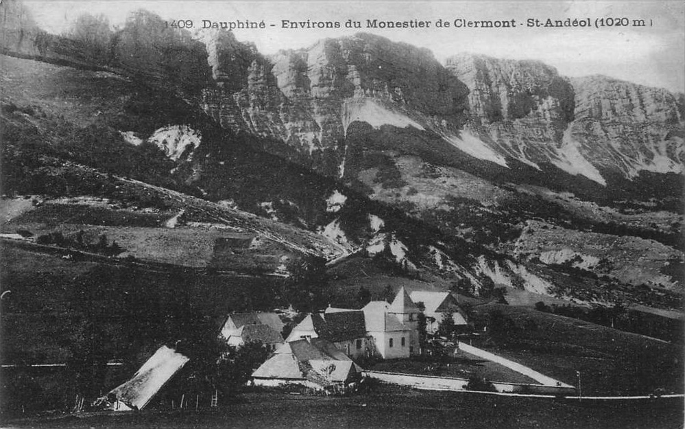 Carte postale ancienne. Dauphiné : environs de Monestier-de-Clermont, Saint-Andéol (Isère).